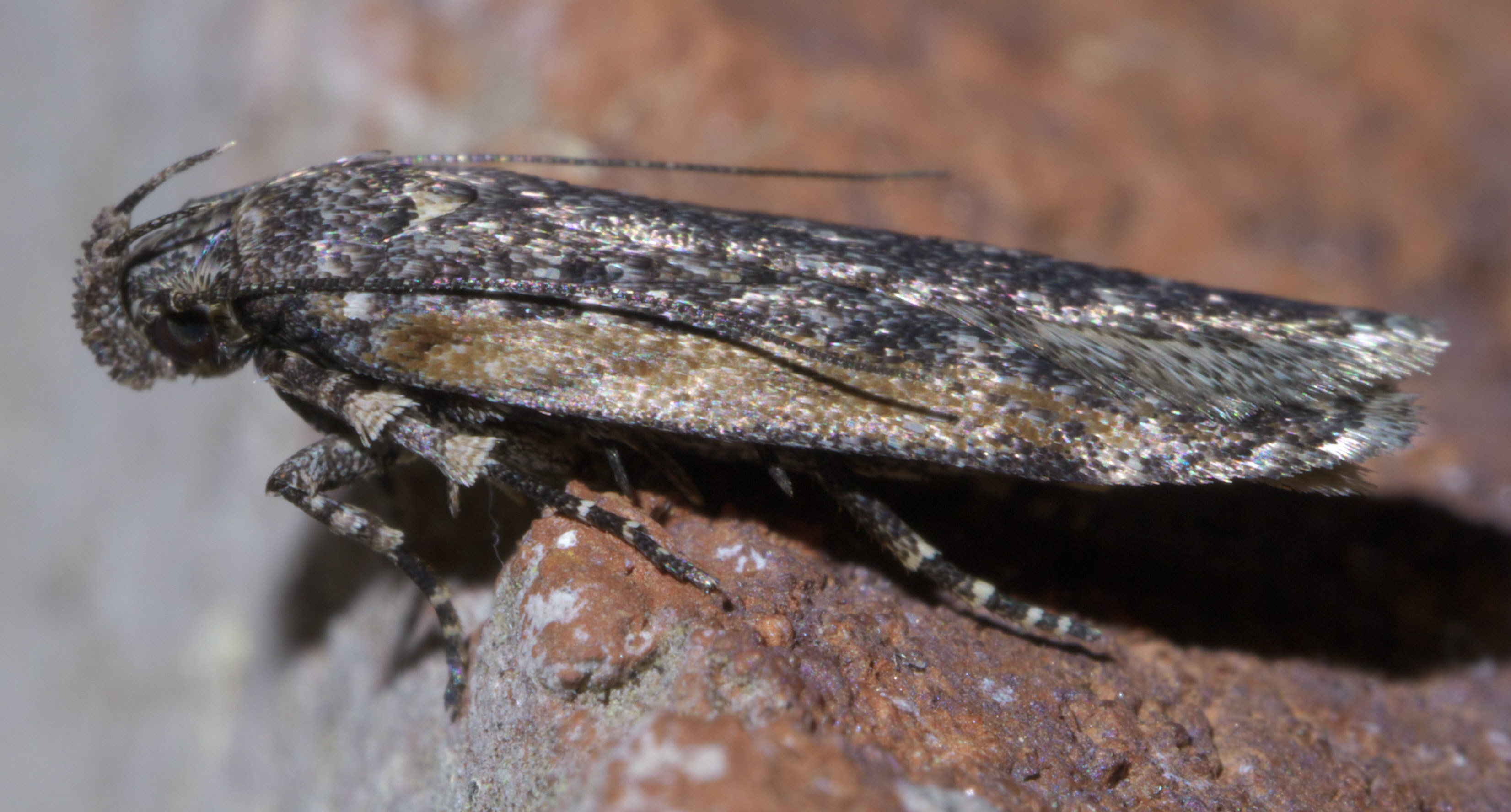 Filatima serotinella, Hodges #2172, Size: 11.1 mm, ID Confidence: 88